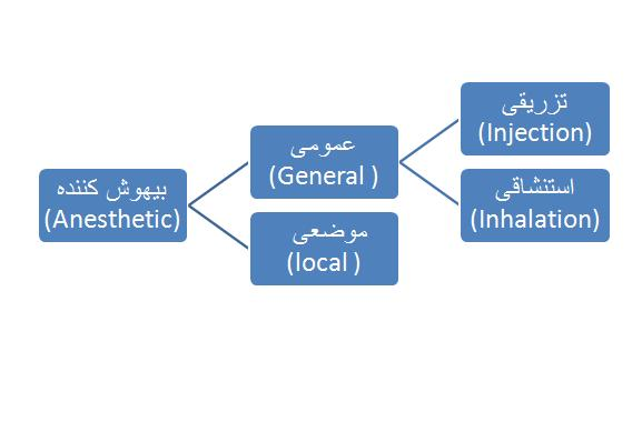 الگوی بیهوش کننده